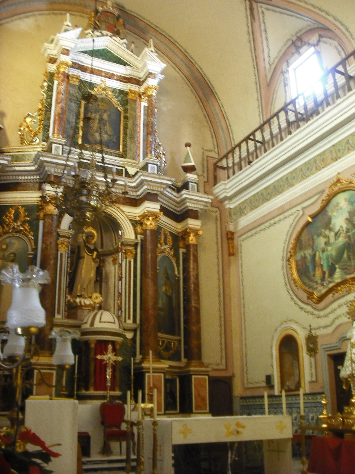 Altar de l'església de Sant Vicent Ferrer.